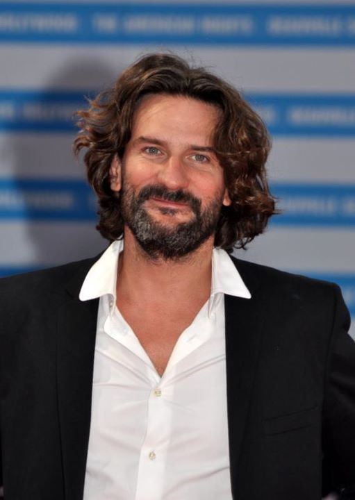 Frédéric Beigbeder au festival de Deauville